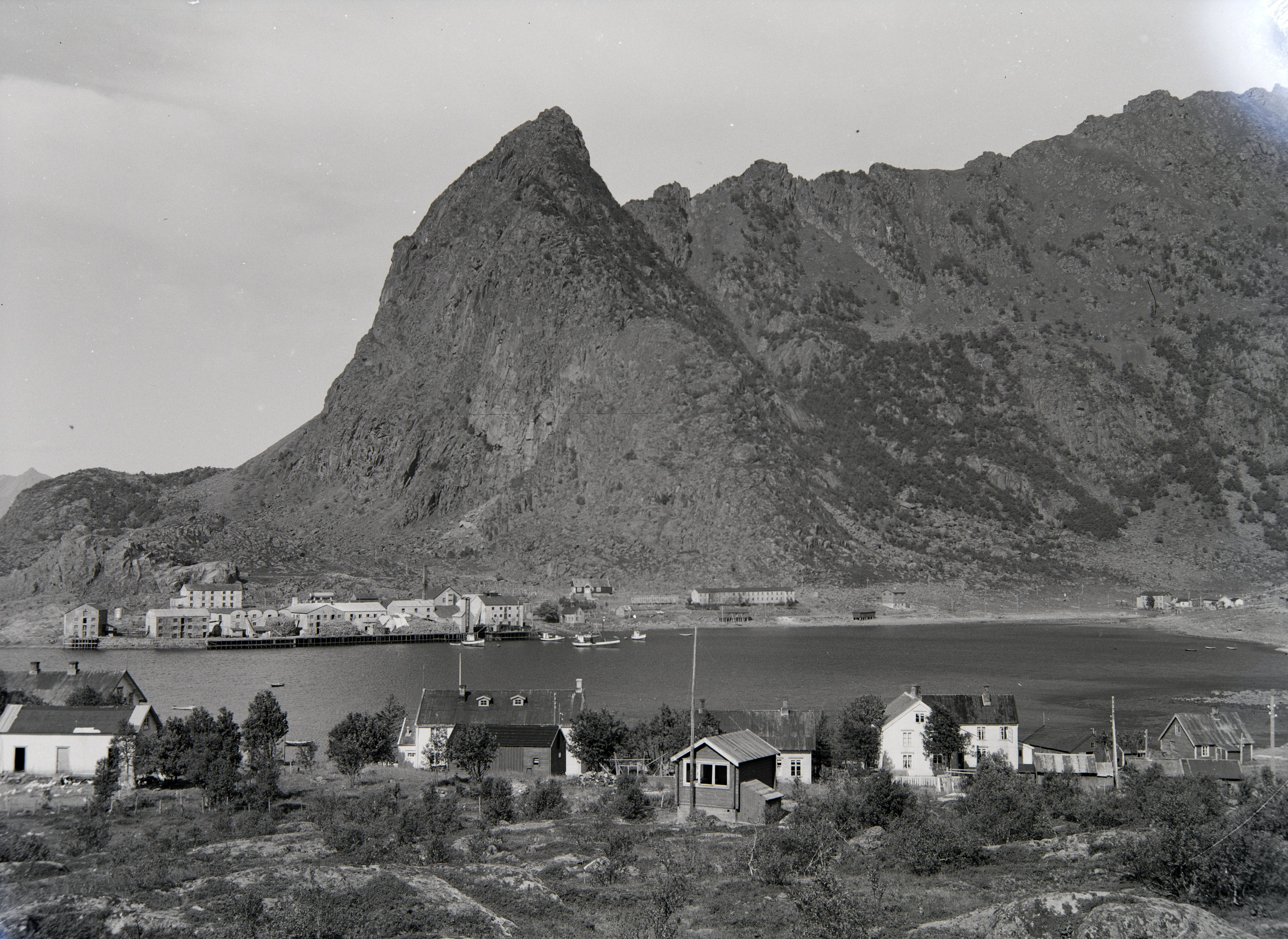 Bildet er hentet fra Nordlandsmuseet bildesamling etter Kanstad. Motivbeskrivelse: Brettesnes Sted: Vågan, Brettesnes Nøkkelord: Topografi og geologi Stedsnavn Boliger Tettsted, bebyggelse